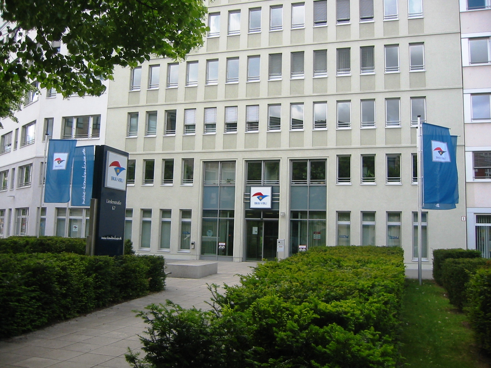 Hauptgeschäftsstelle der Krankenkasse BKK VBU in der Lindenstraße/Ecke Rudi-Dutschke-Straße in Berlin-Kreuzberg